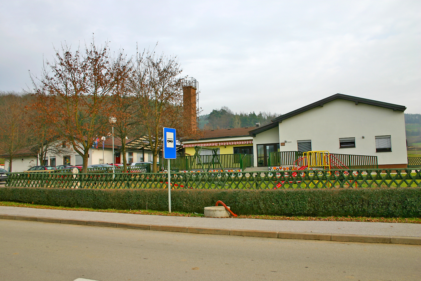 OŠ Kuzma Elementary school Kuzma Grundschule Kuzma